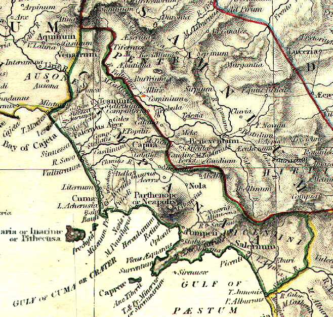 Reference map for Roman Campania felix